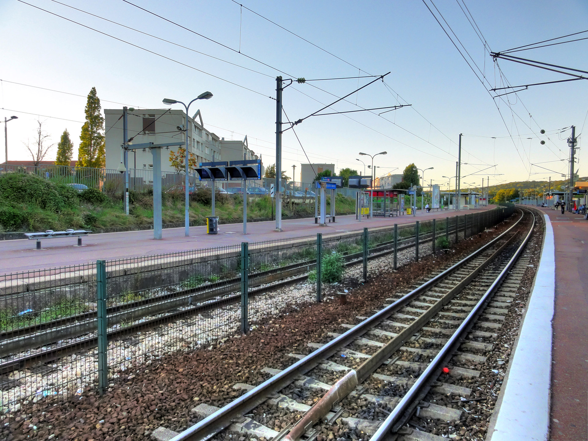 La gare de Sarcelles - Saint-Brice, Val-d'Oise, France. Photo HDR.